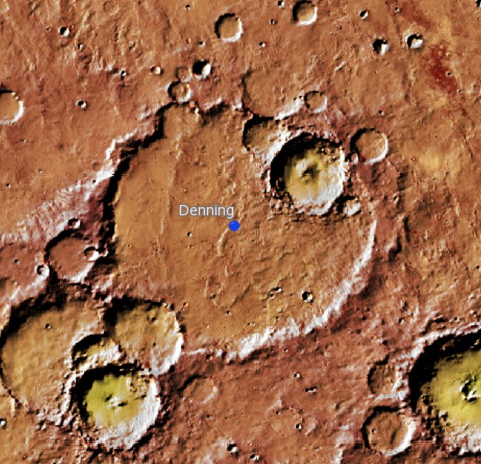 Cráter marciano Denning (IAU/USGS, Goddar/A SU/USGS)